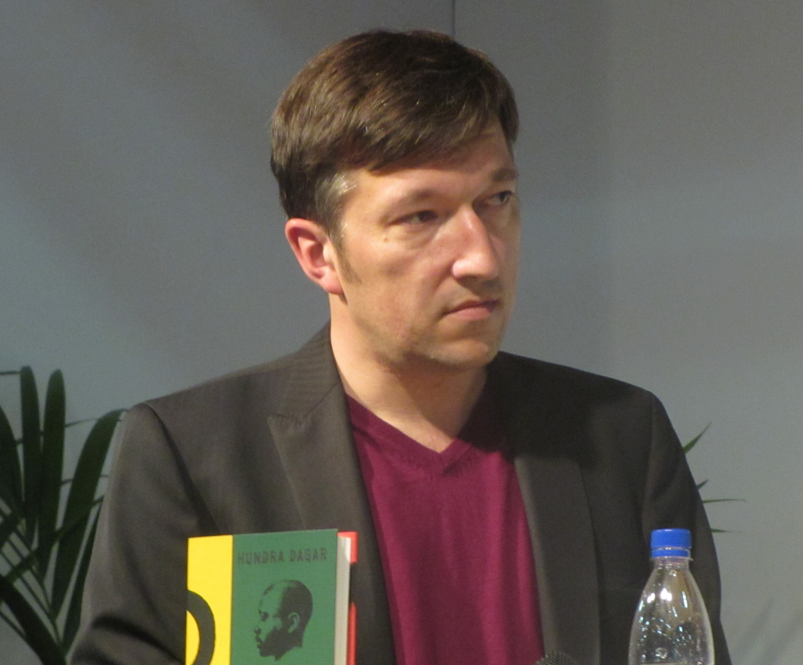 Schweizer Autor Lukas Bärfuss.